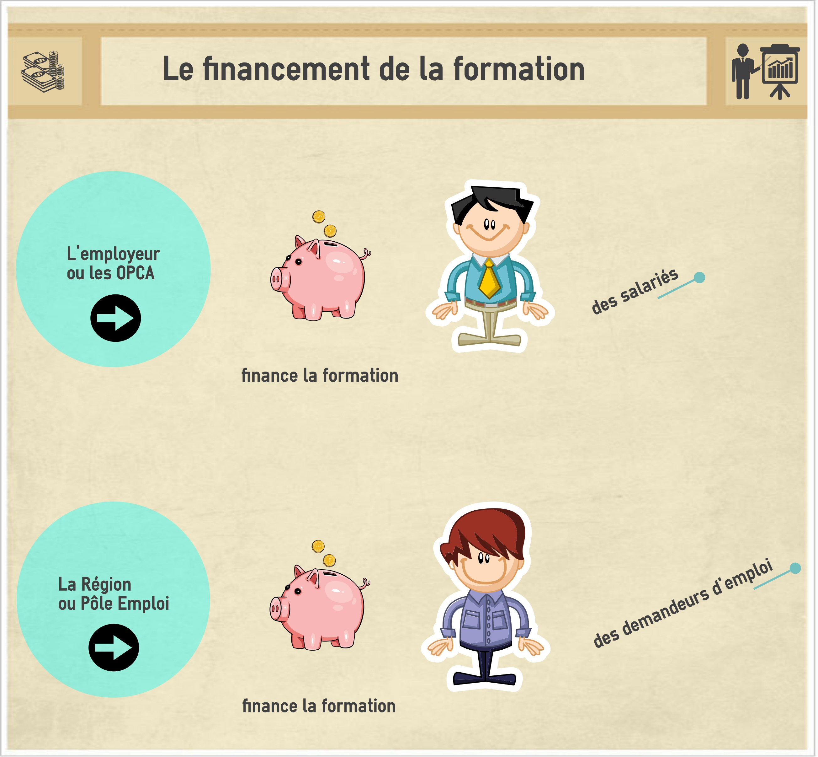 infographie financement formation